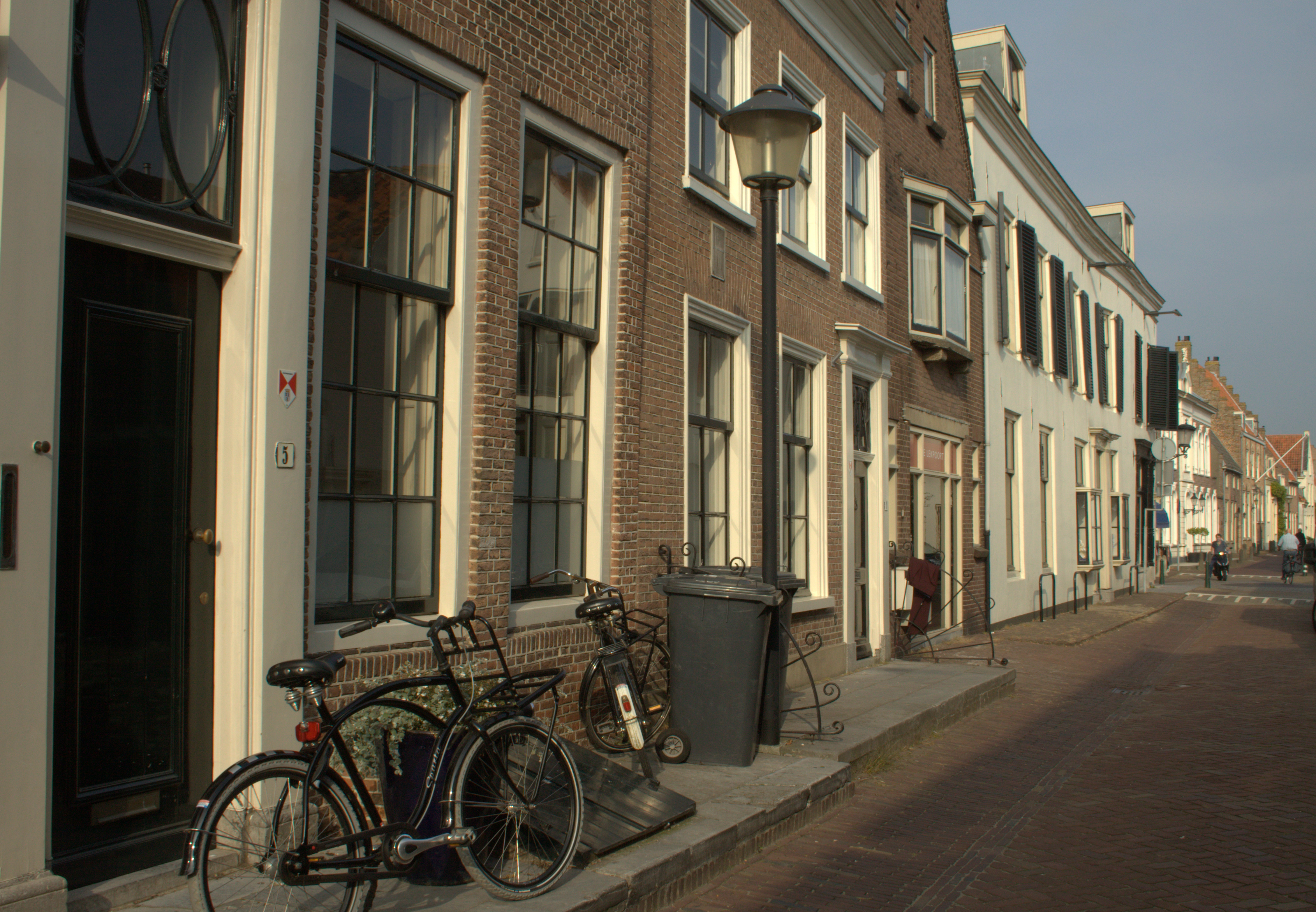 De Kortedijk, richting de Voorstraat in Vianen.